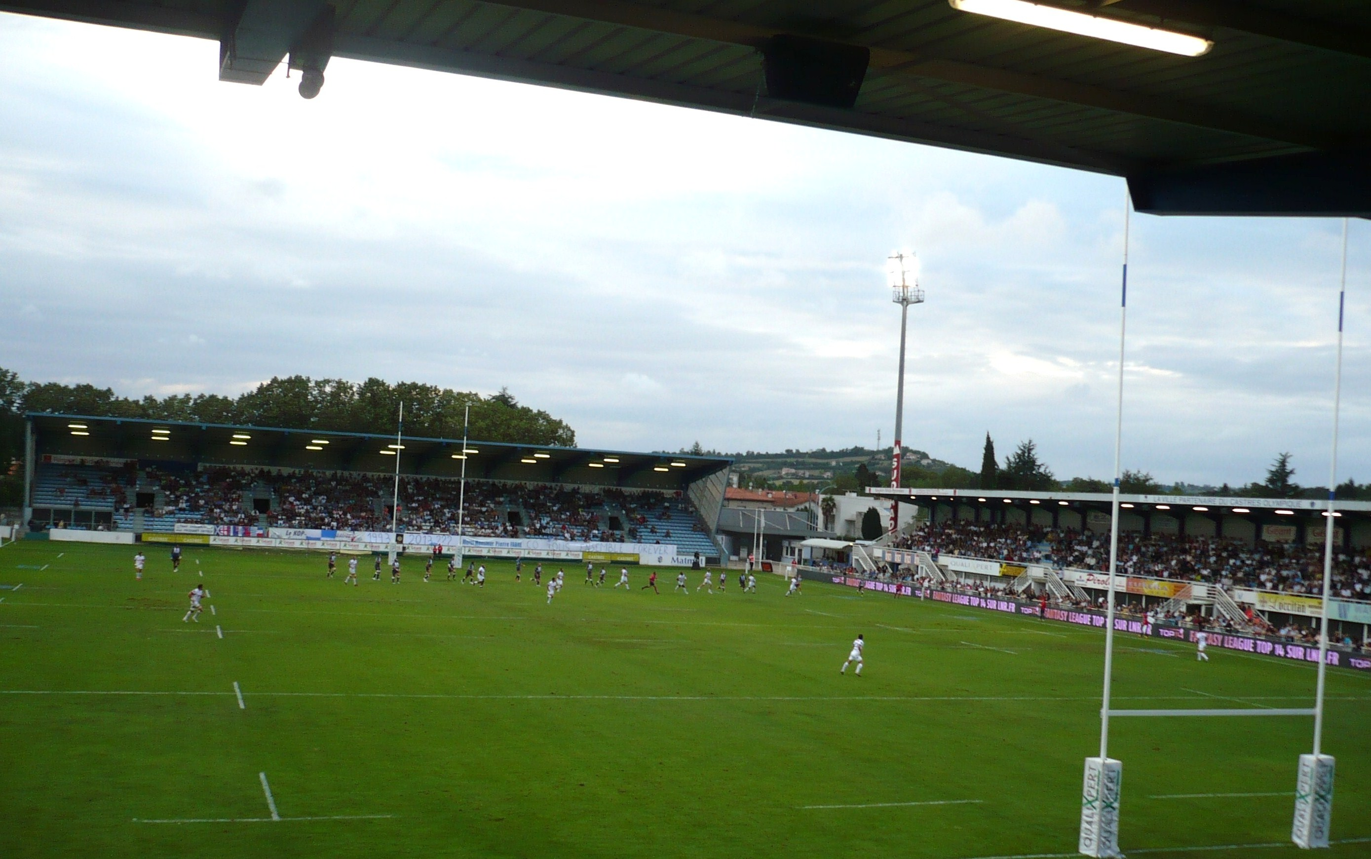 Stade Pierre-Antoine à Castres dans le département français du Tarn : tribune Nord et Gabarrou